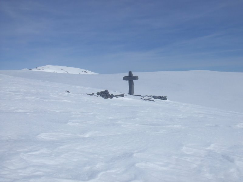 Chapelle du Cantal sous la neige.